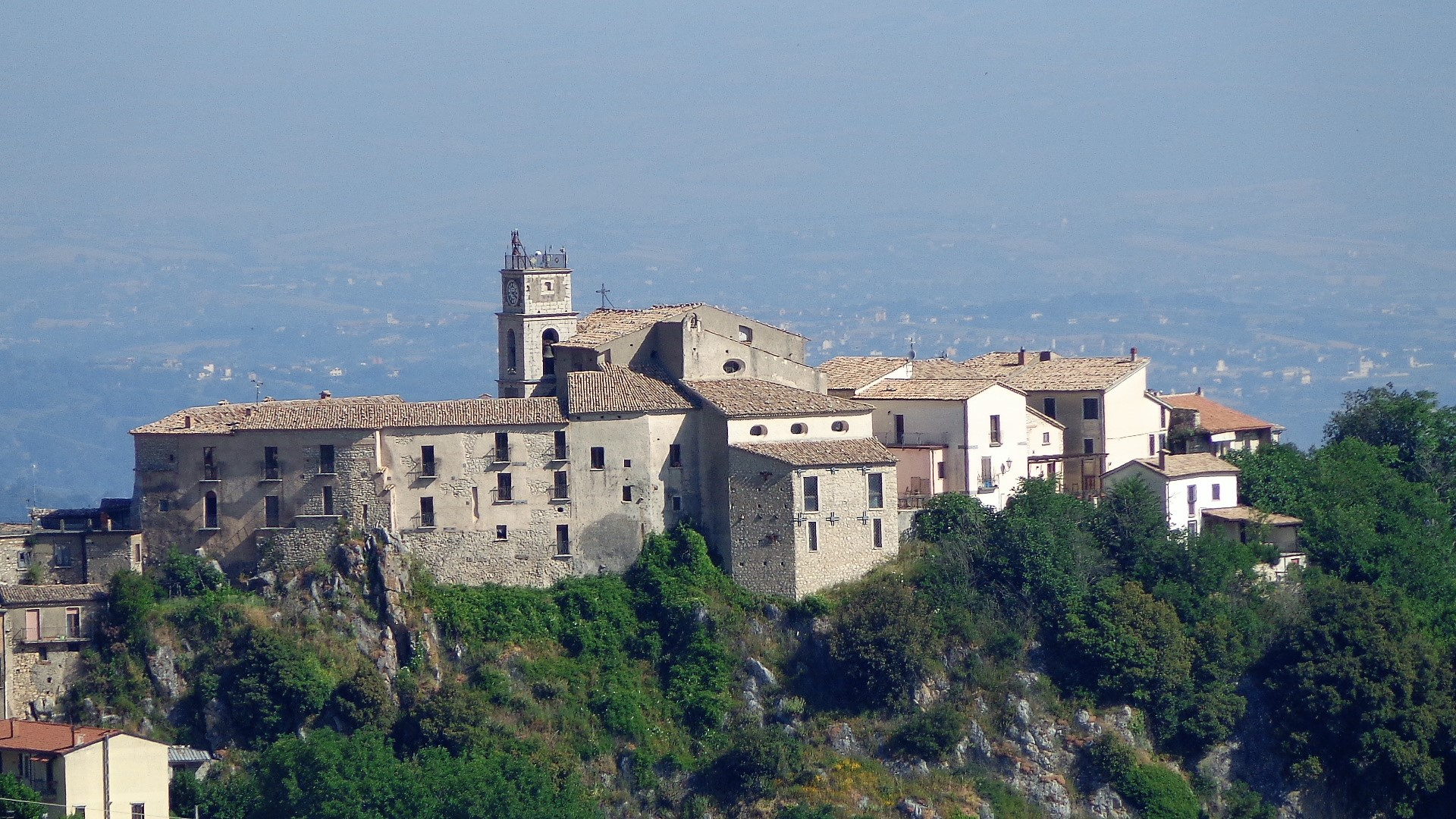 Veduta panoramica da Montemarano.